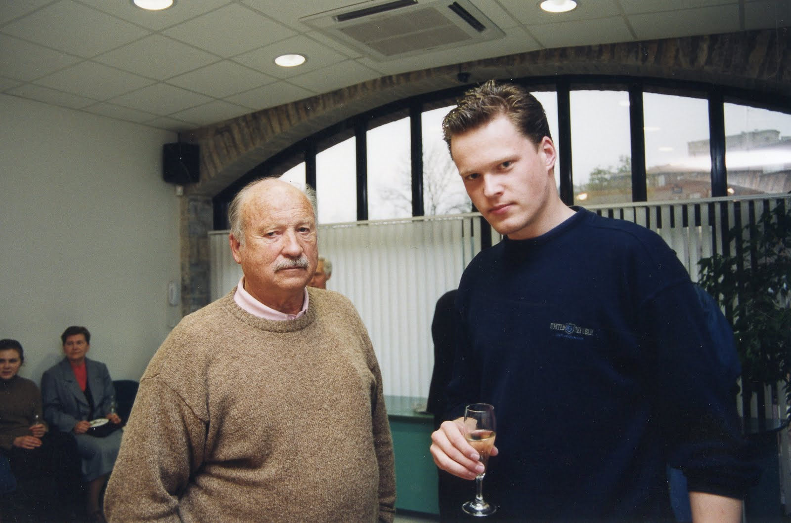 Hellar Grabbi ja Jaak Urmet 16. mai 2001 Rahvusraamatukogus. Aarne Rubeni romaani "Vares-Barbaruse valitsus" esitlus. Foto tegi Teet Malsroos.